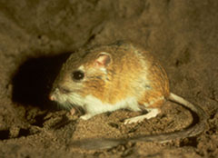 Ord's Kangaroo Rat, Dipodomys ordii